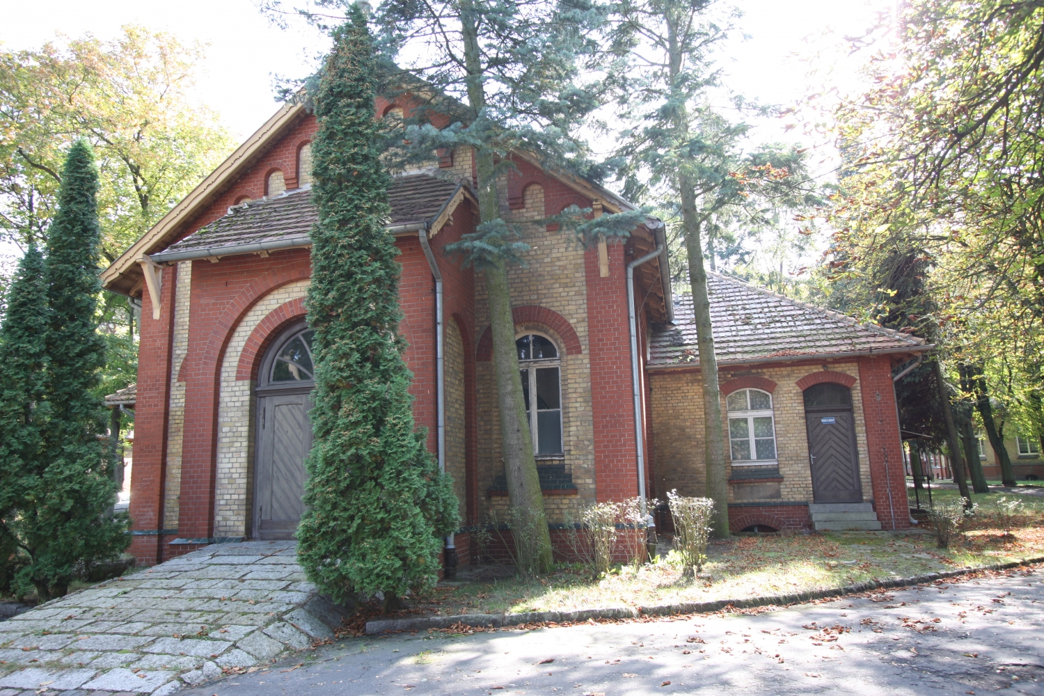 Międzyrzecz, ul. Poznańska 109 - kostnica, w zespole szpitala psychiatrycznego, mur., 1901-1914 (zabytek nr 389/92 z 13.04.1992)